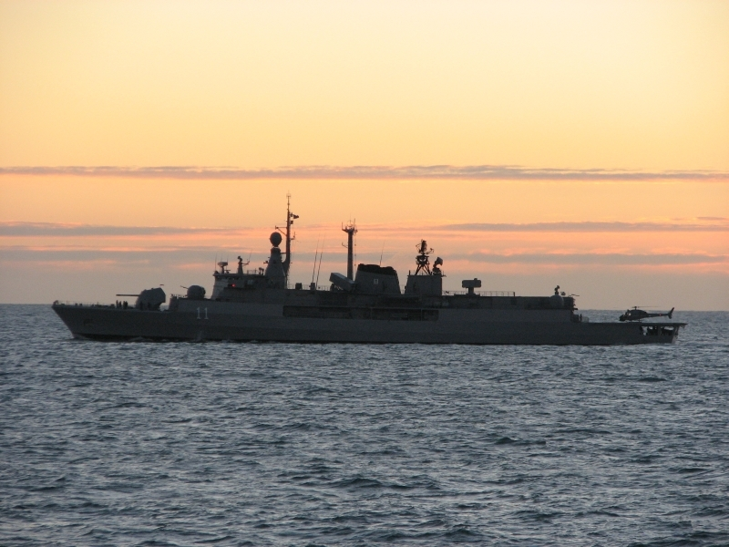 Destroyer Meko 360H2 ARA La Agentina D-11.